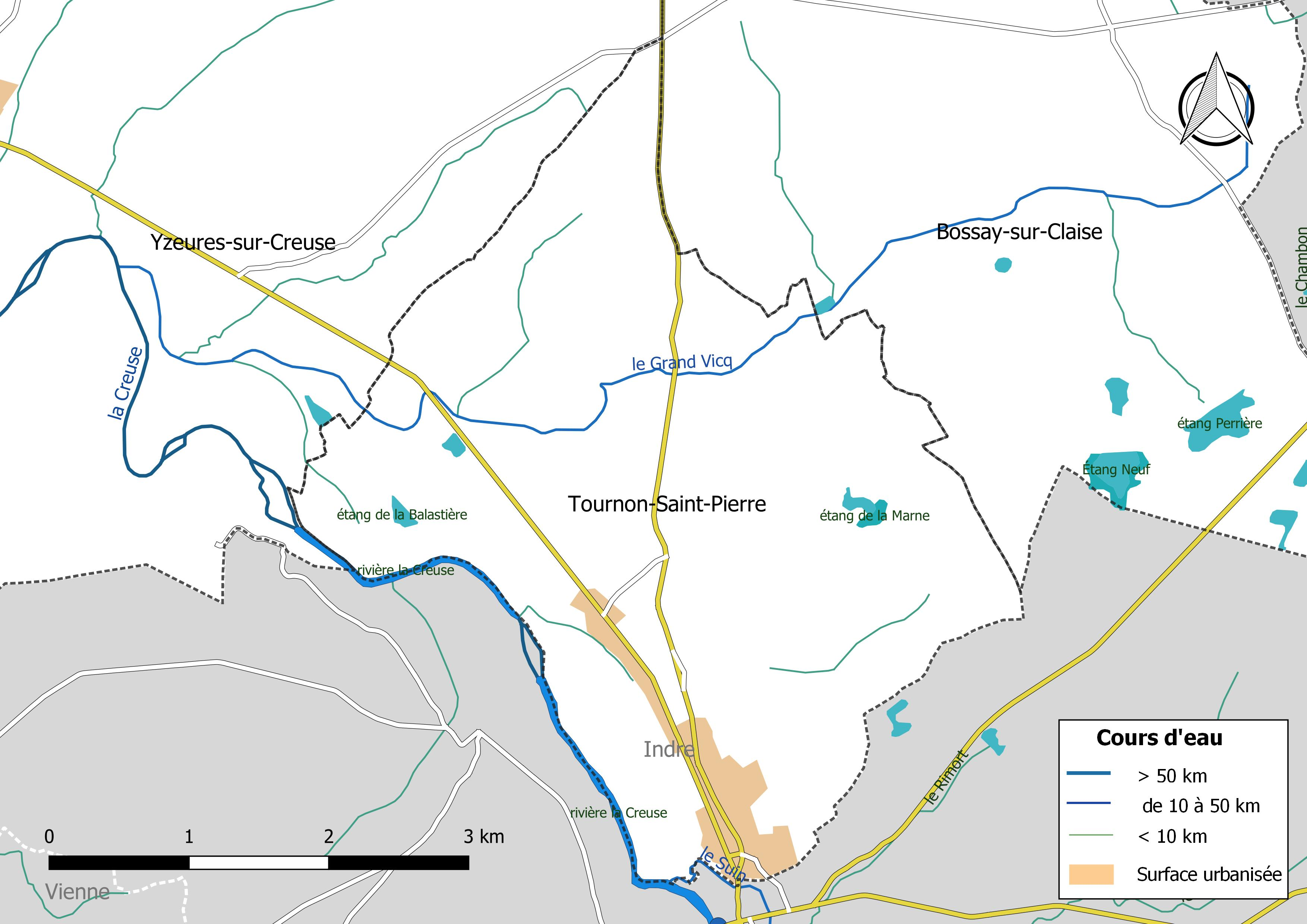 Carte du réseau hydrographique de la commune de Tournon-Saint-Pierre (France).